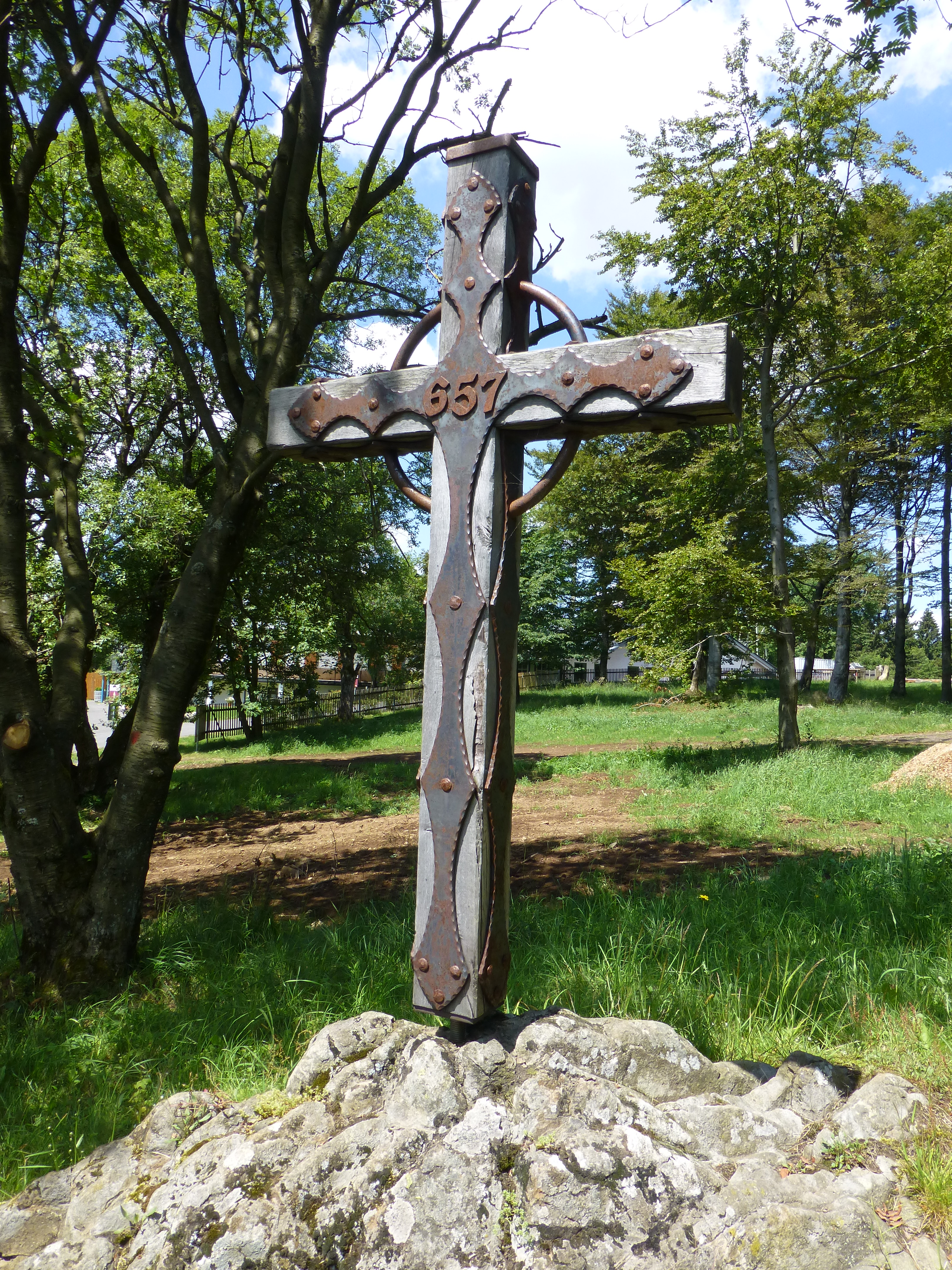 Gipfelkreuz an der Fuchskaute (nicht am höchsten Punkt)